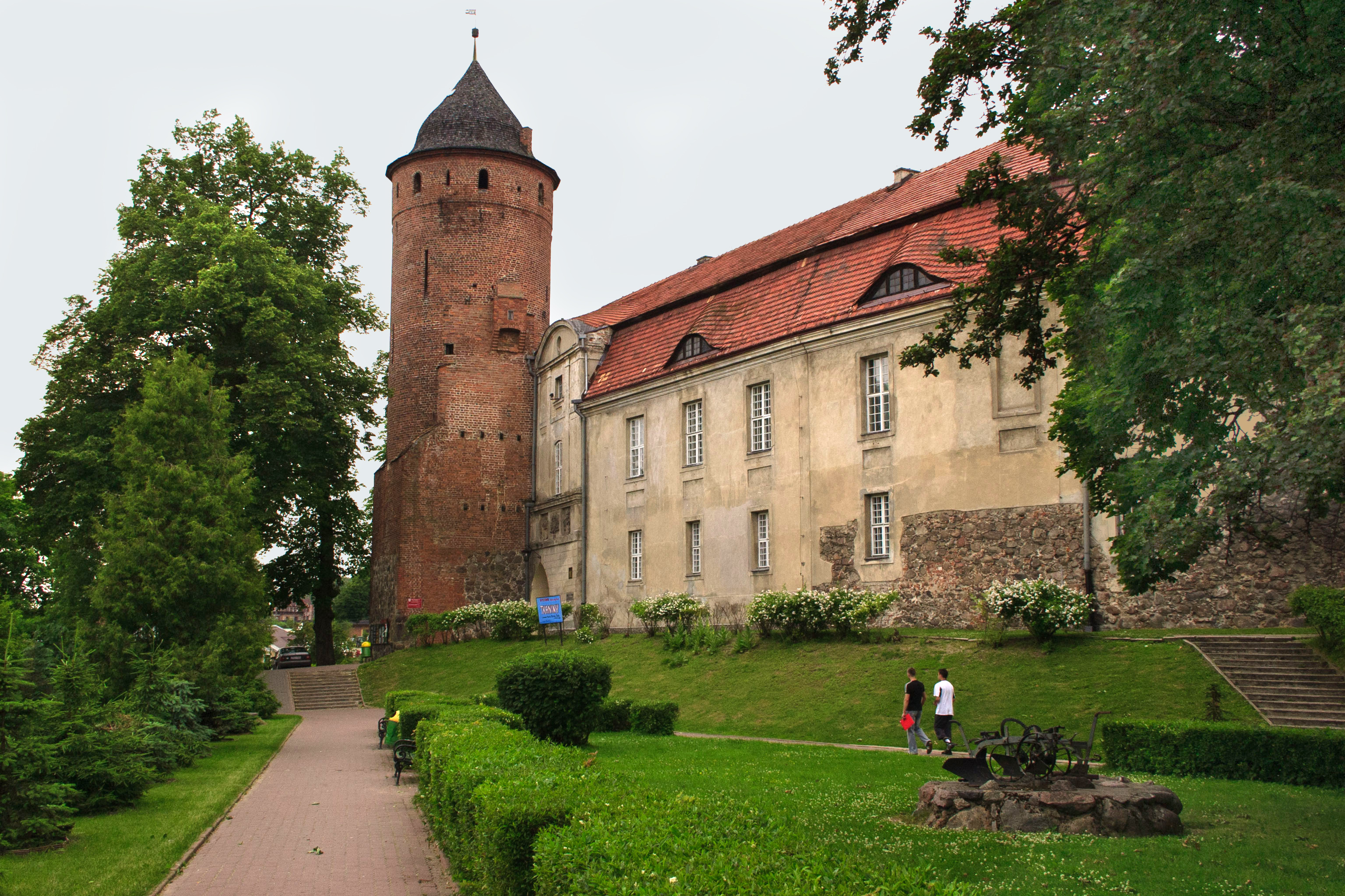 Zamek, XIV-XVIII-XX, Świdwin